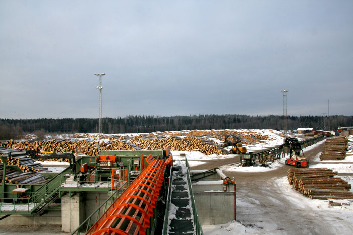 Setras sågverk i Hasselfors